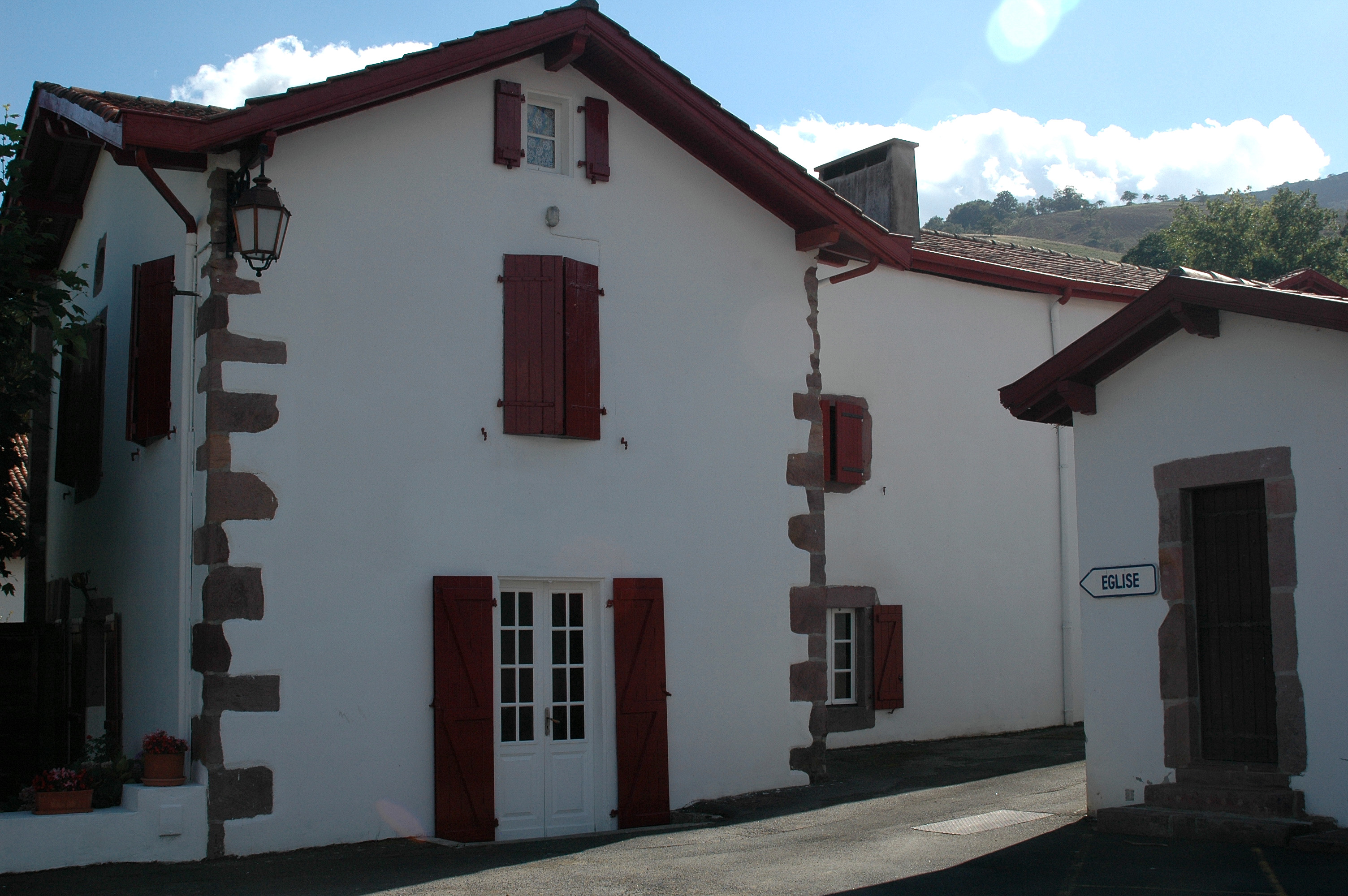 Saint-Martin d'Arrossa, maisons de Basse Navarre. Photo prise le 03/08/06 par Harrieta171